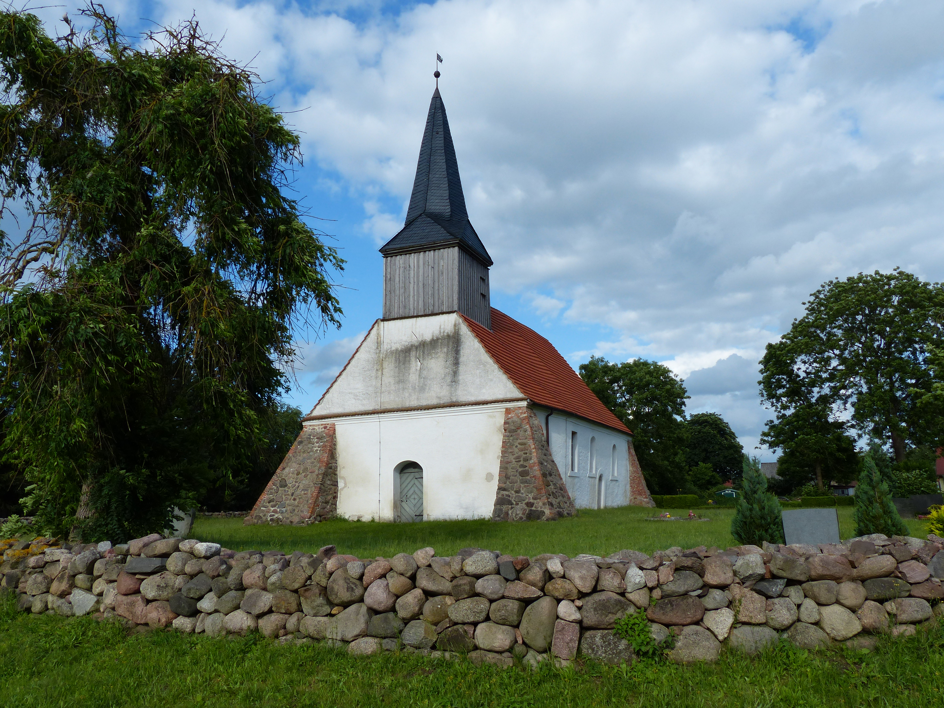 Kirche Rossin, Ansicht von Südwesten, Friedhofsmauer aus Feldstein